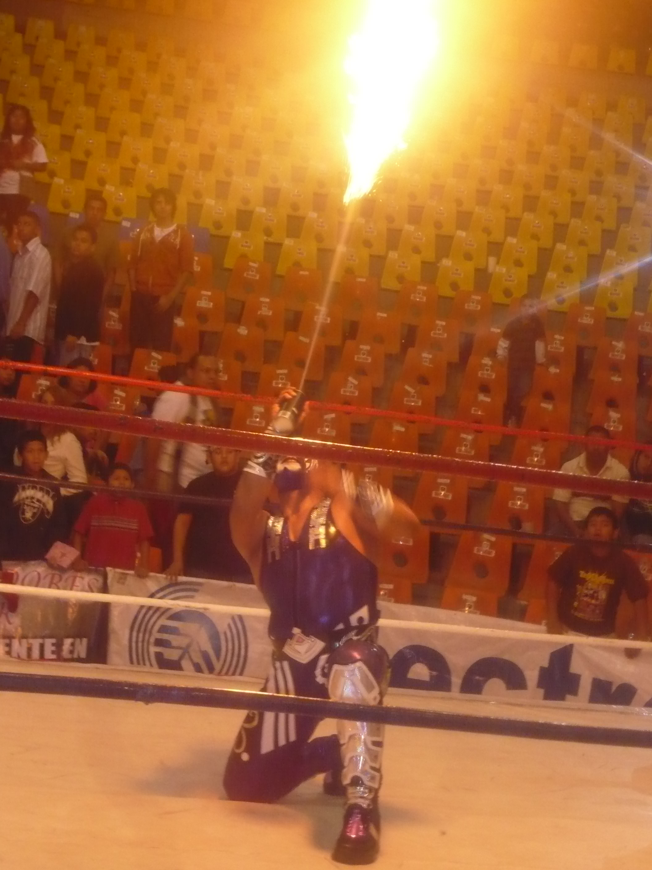 Abismo Negro (Angel Mensajero)